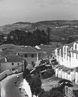 Entrada da aldeia da Picanceira, à direita o Bairro dos Ilheús